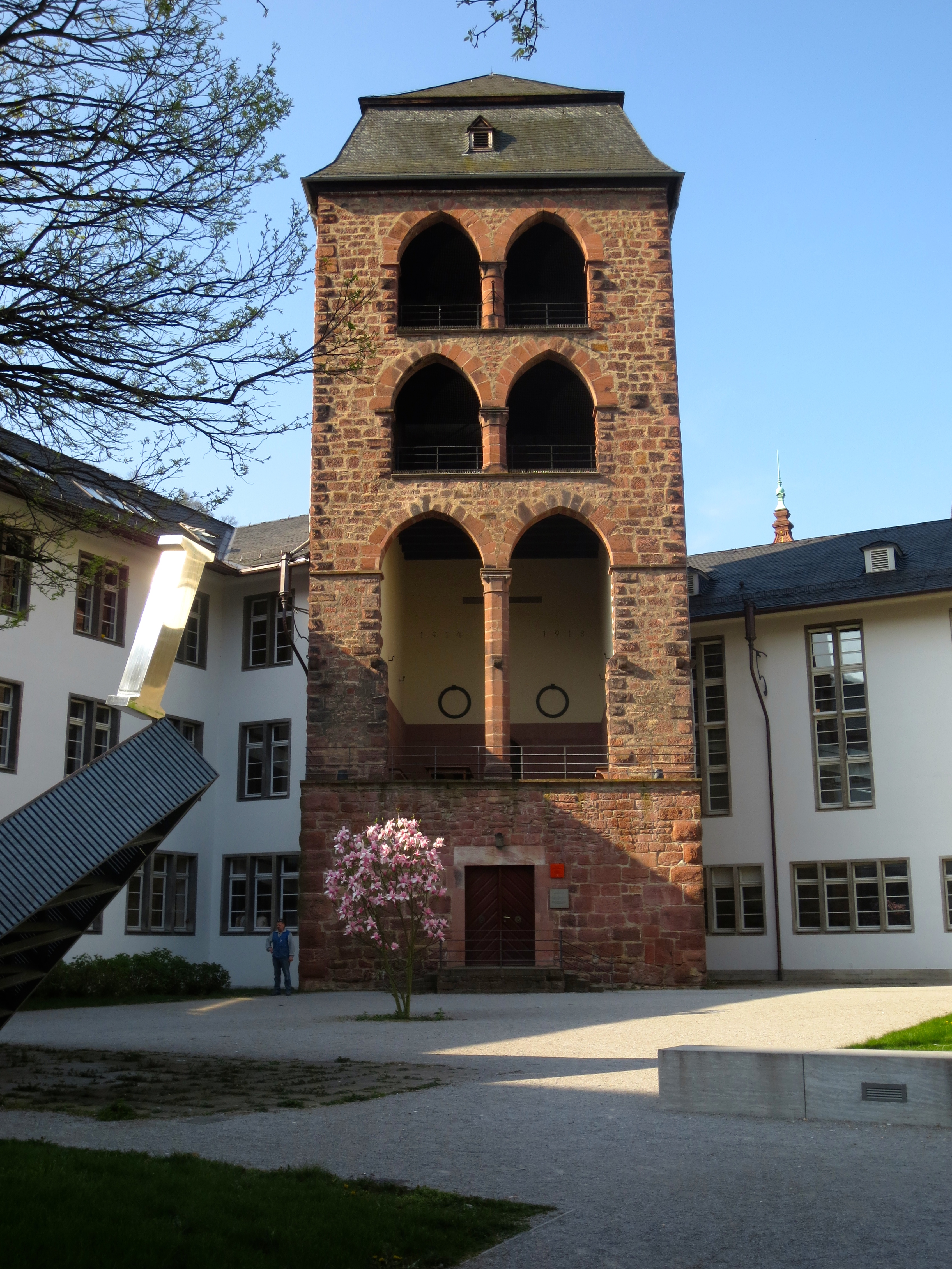 Altstadt Campus Universität Heidelberg Innenhof Hexenturm